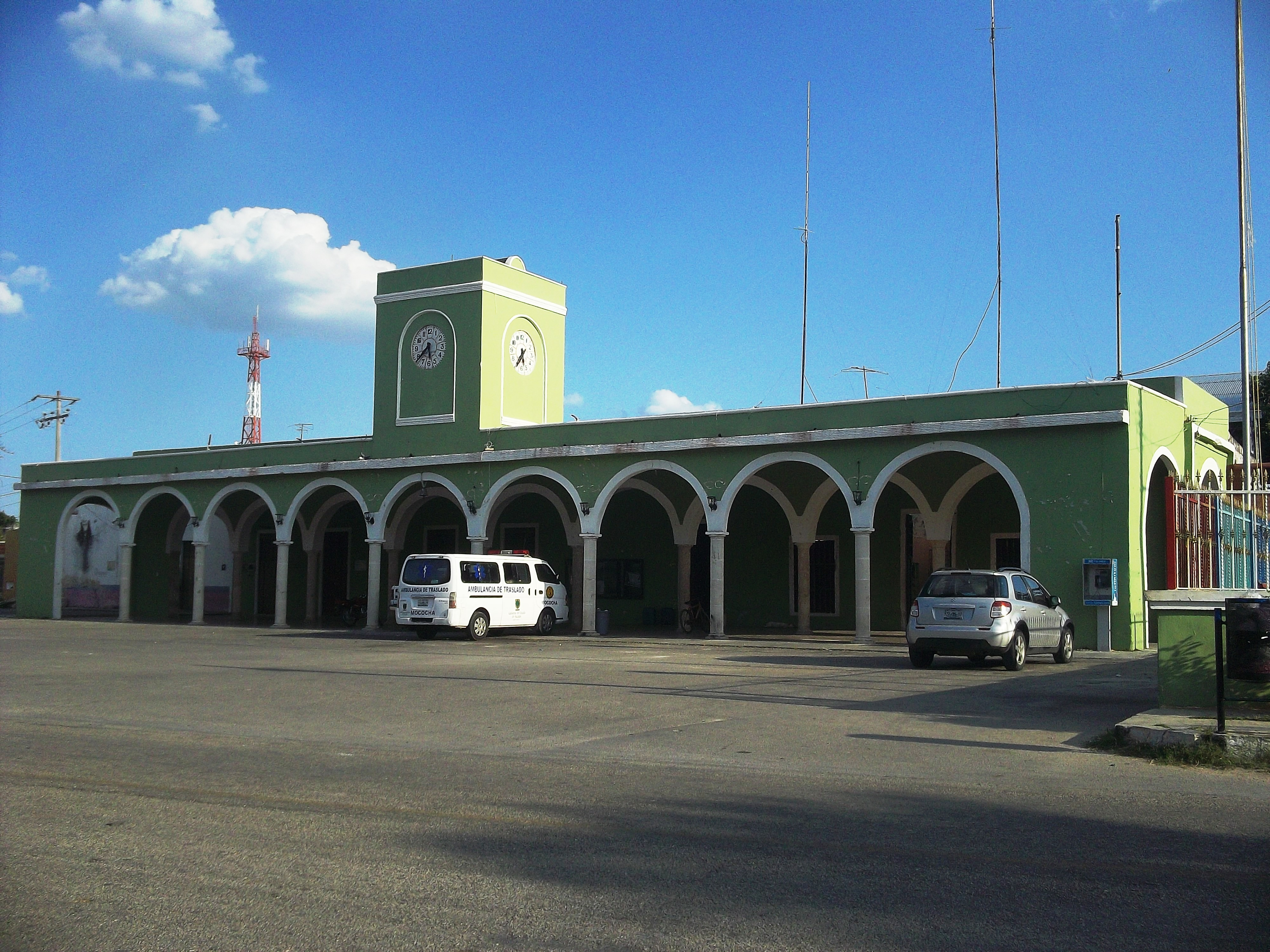 Palacio municipal de Mocochá, Yucatán.